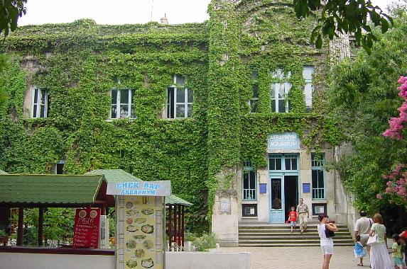 Das Aquarium in Varna, Bulgarien